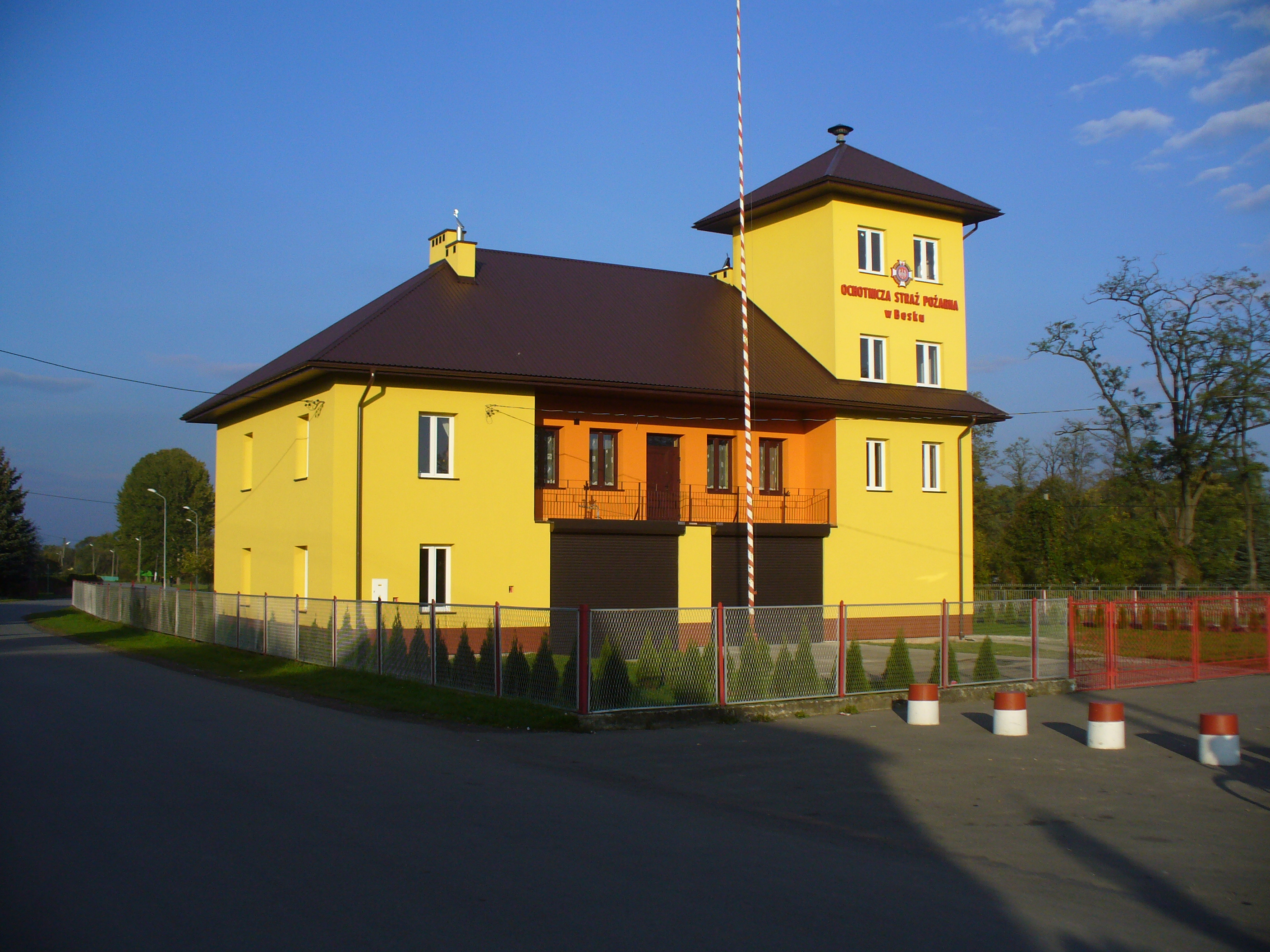 Besko - Straż Pożarna